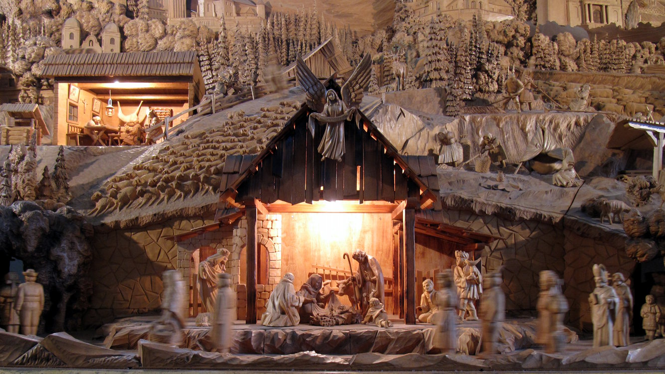 Slovenský betlehem v Rajeckej Lesnej